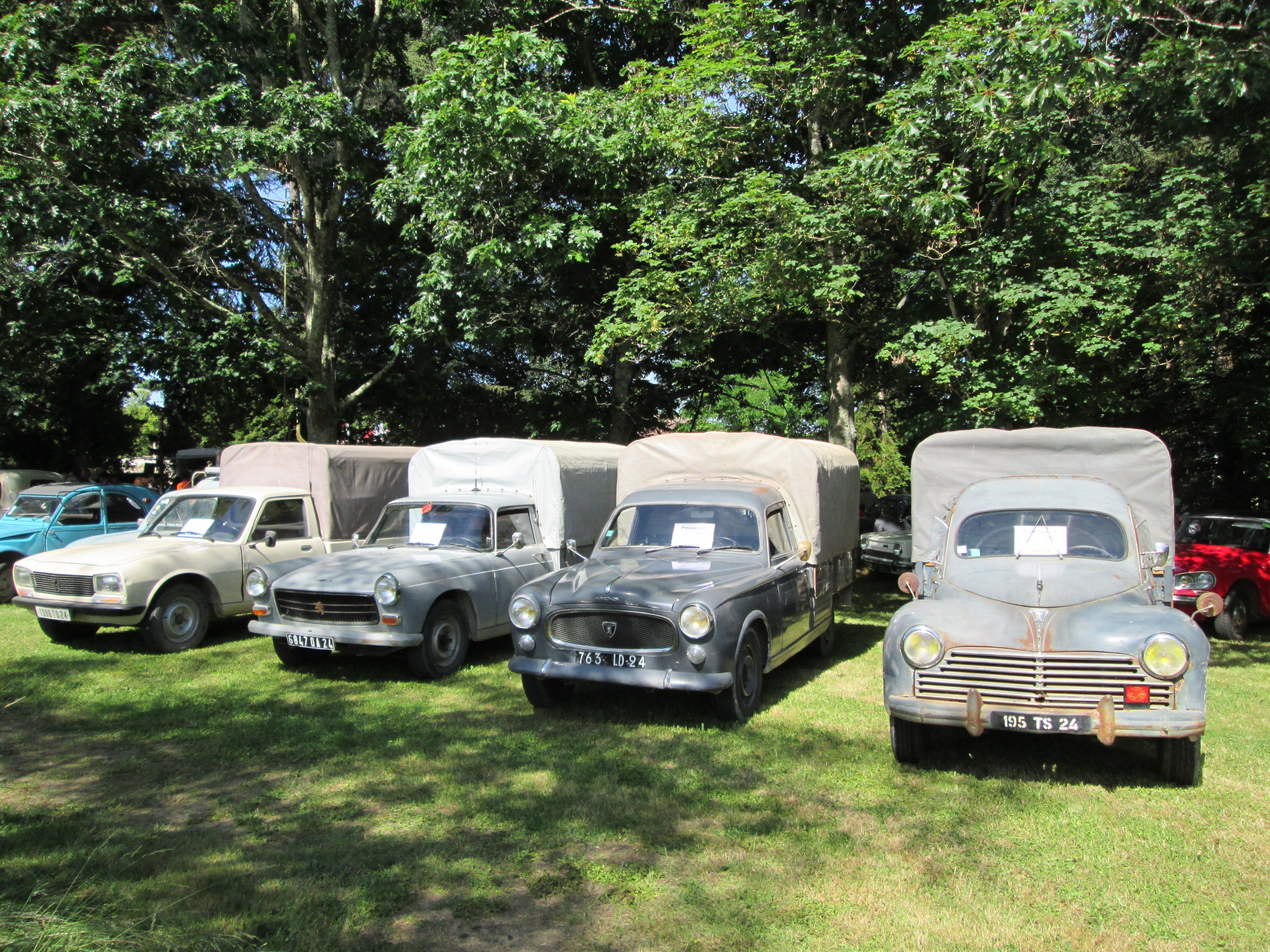 Peugeot Pickup 504, 404, 403 et 203 (de gauche à droite).